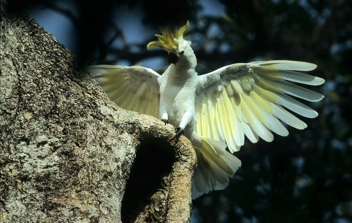 Gelbhaubenkakadu auf der Kap-York-Halbinsel. Der Vogel hat vergeblich versucht sein Nest zurückzuerobern.